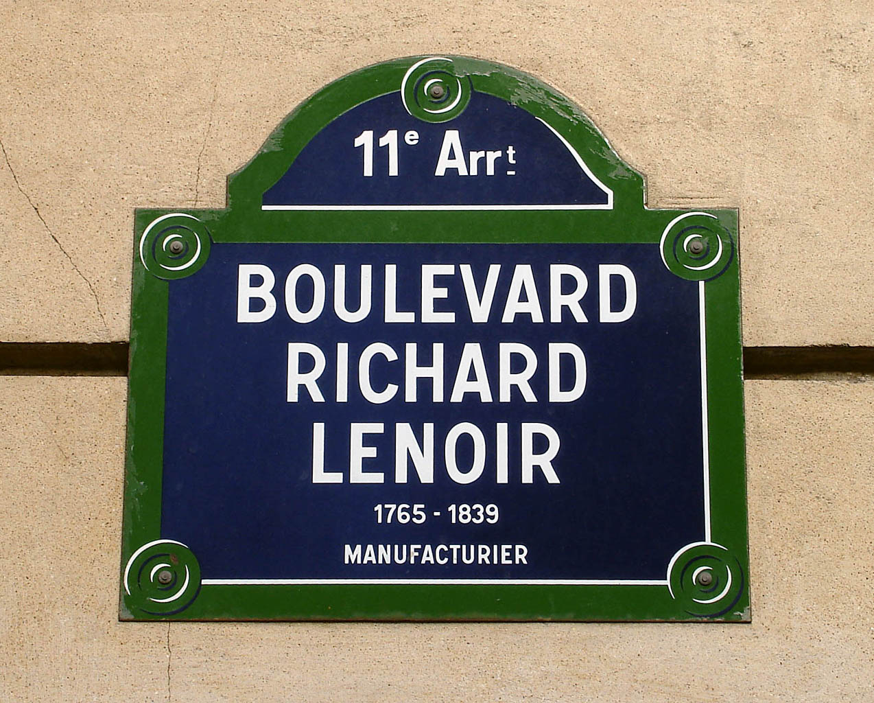 Plaque du boulevard Richard-Lenoir à Paris (France)